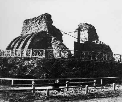 Золоті ворота (Київ): Золоті ворота, фото початку XX ст